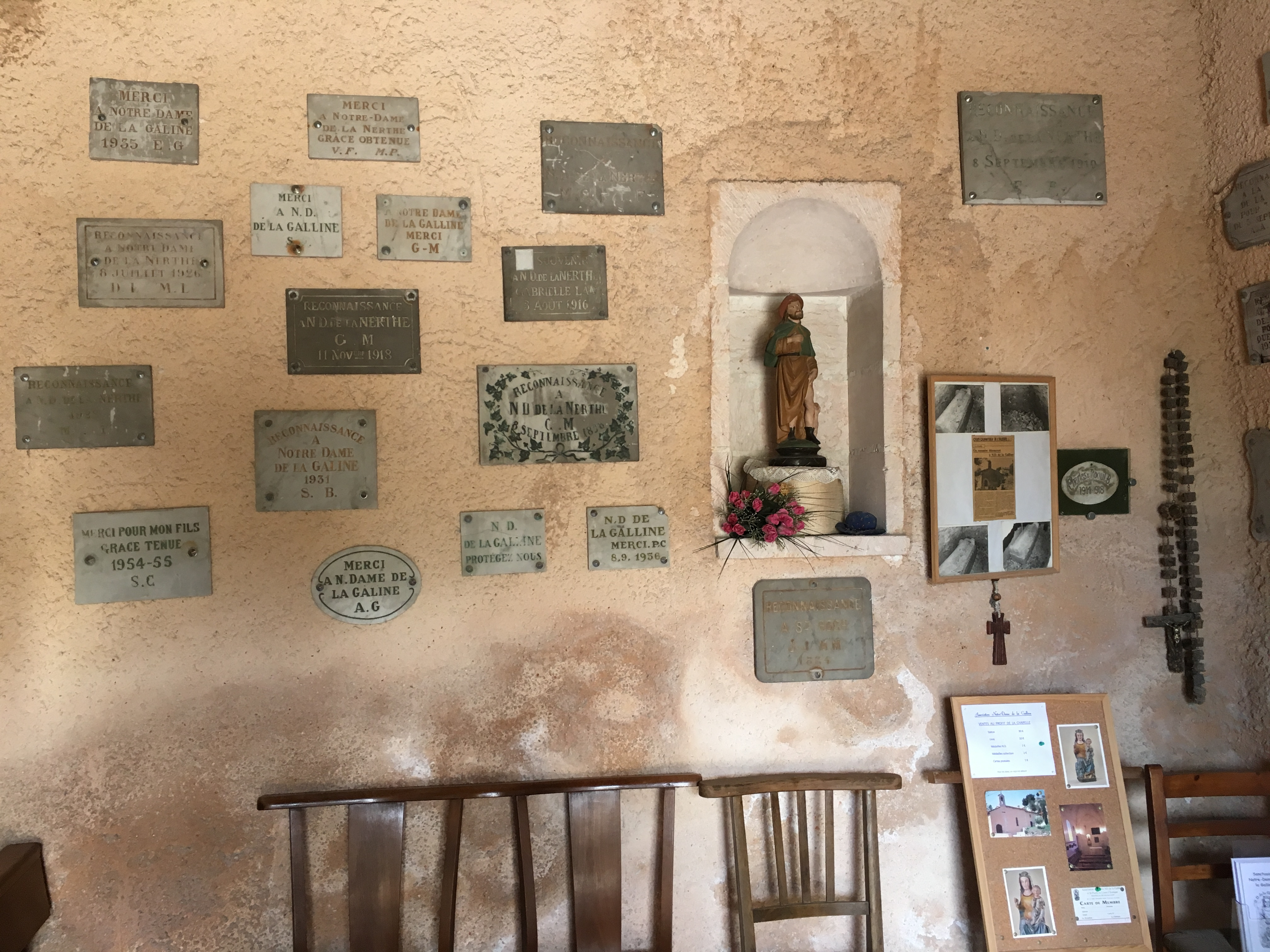 Notre-Dame de la Galline (ou Galine) est une chapelle située au hameau de la Nerthe, à la pointe nord-ouest de la commune de Marseille, sur l'ancien chemin reliant l'Estaque à Gignac. Ex votos et statut de St Roch